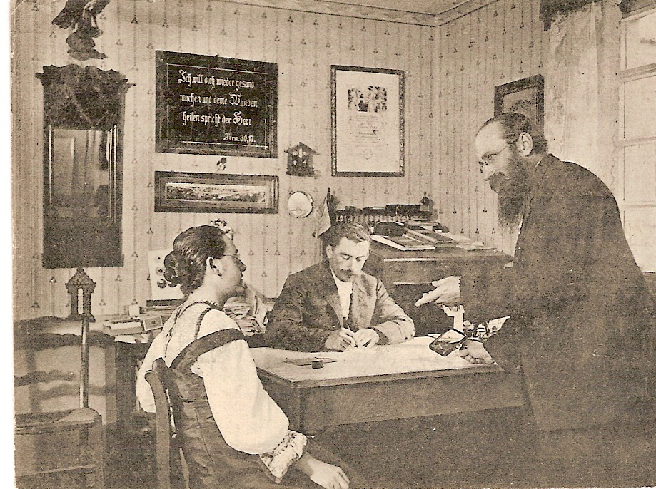 Der Moerser Lehmpastor Emanuel Felke in seinem Arbeitszimmer (stehend). Postkarte Verlag von Otmar Lade (existiert nicht mehr), Repelen 1908 gescant von Lutz Hartmann, 21.5.2006